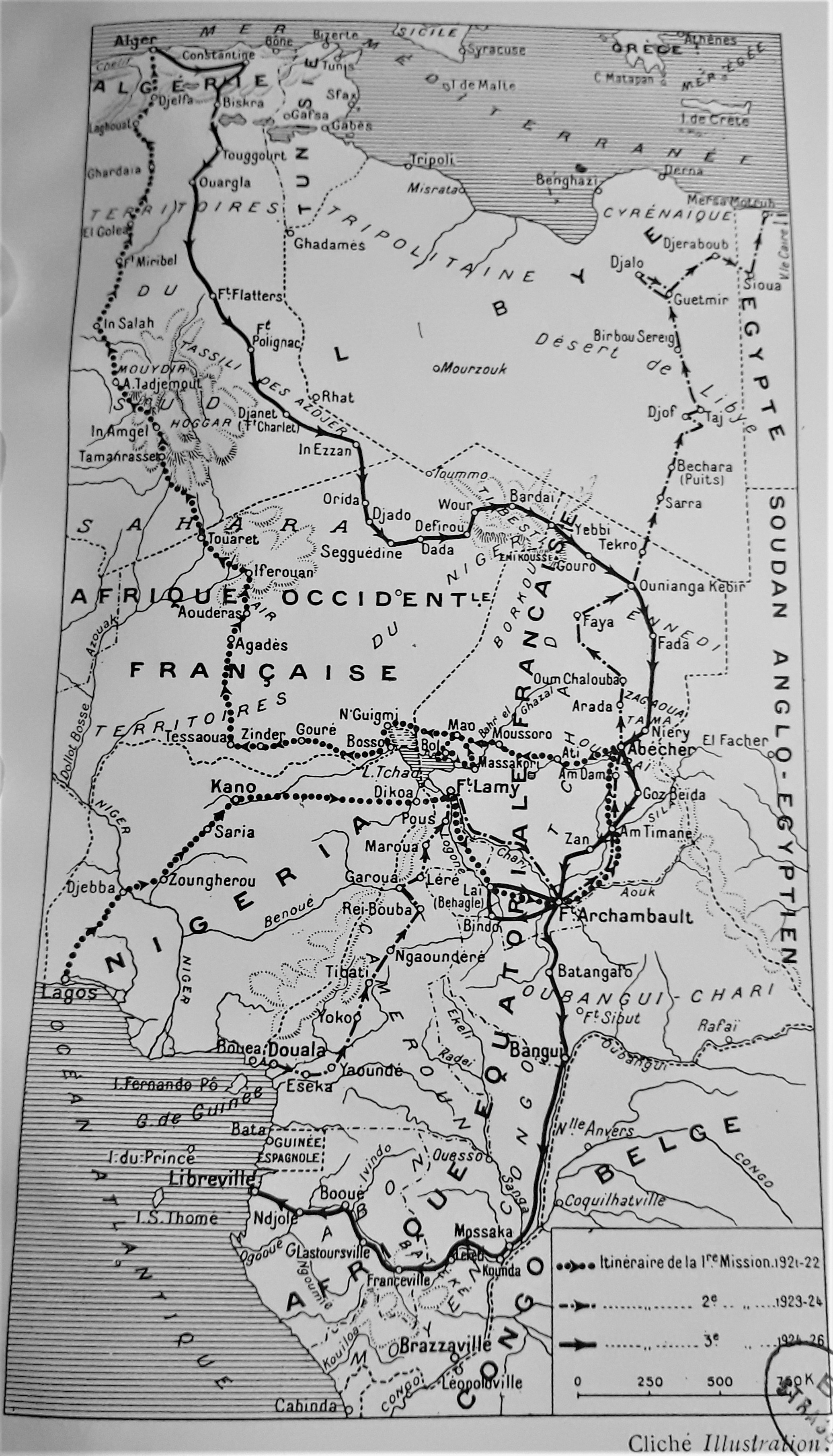 Itinéraires des trois missions Bruneau de Laborie, tiré de L'ILLUSTRATION N°4342 22 MAI 1926